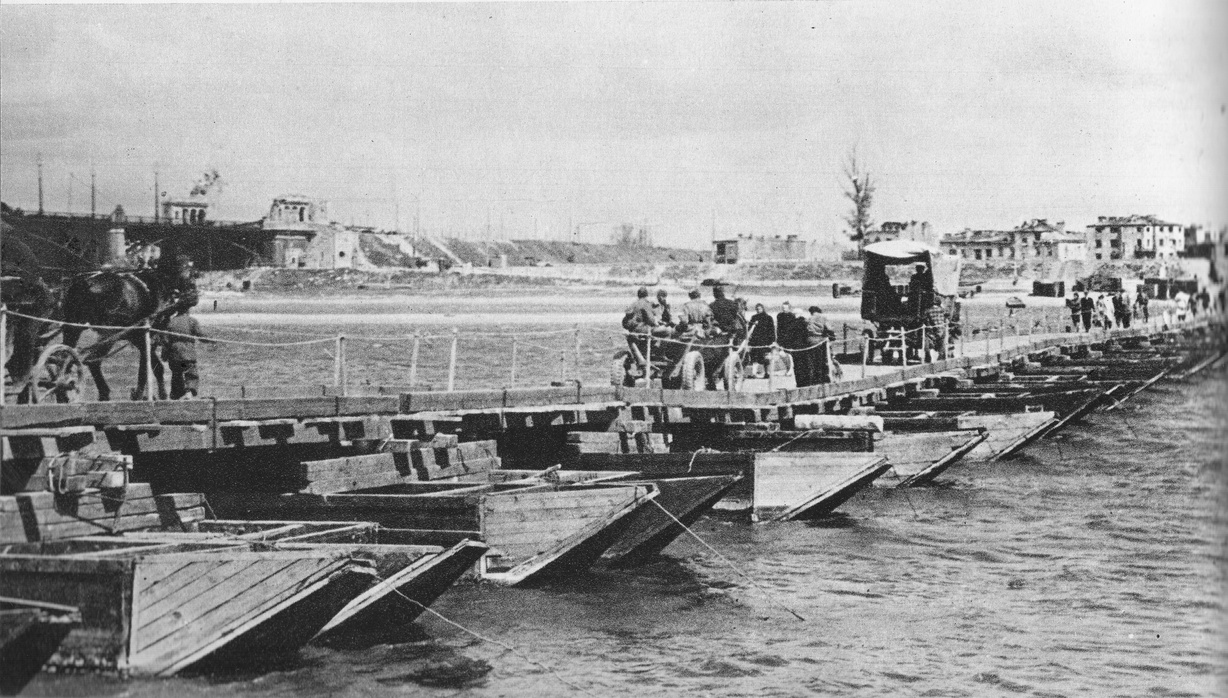 Most pontonowy zbudowany przez polskich saperów na linii ulic: Jakubowska-Ludna w Warszawie